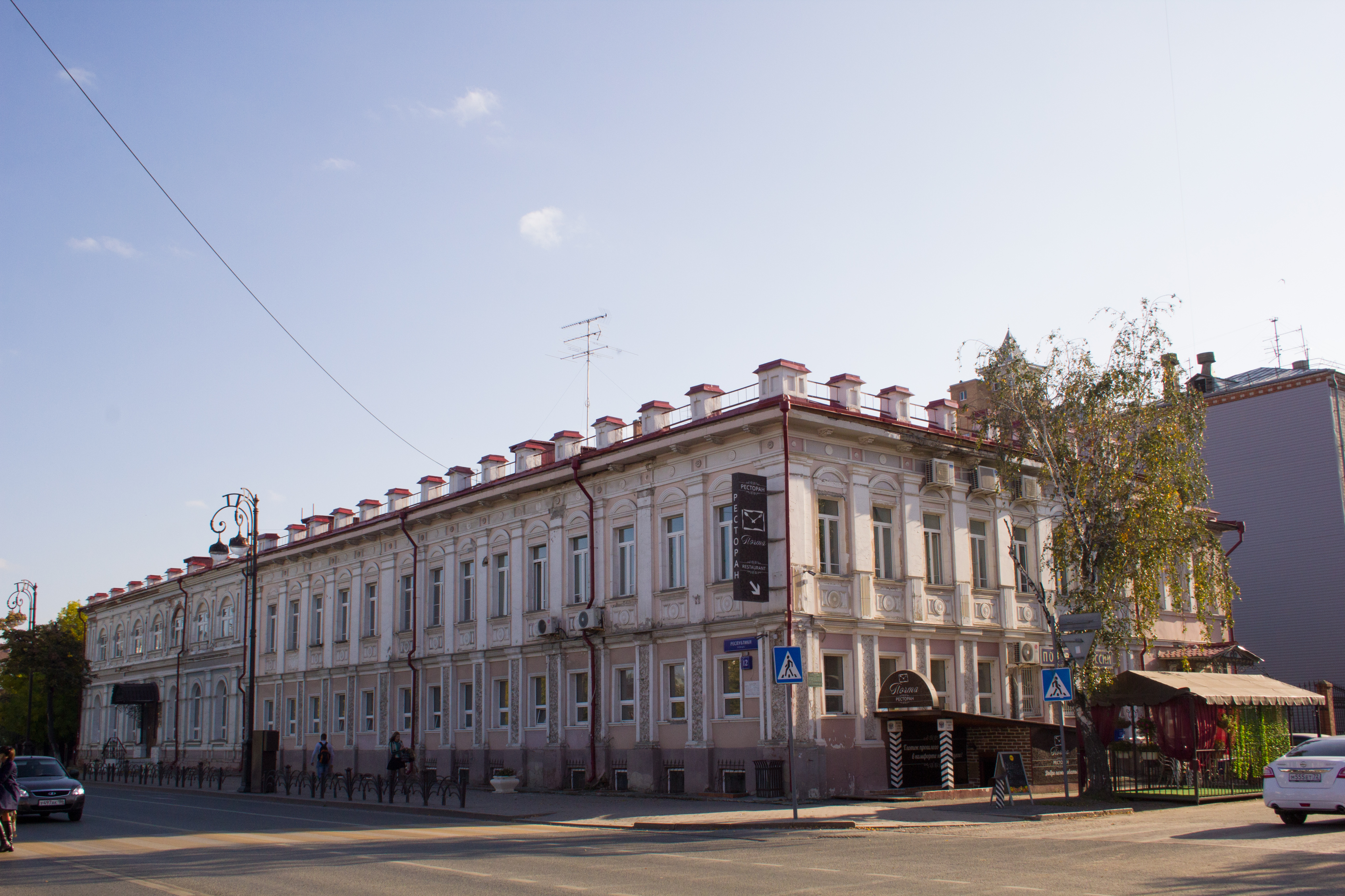 Контора почтовая: улица Республики, 12, Тюмень, Тюменская область